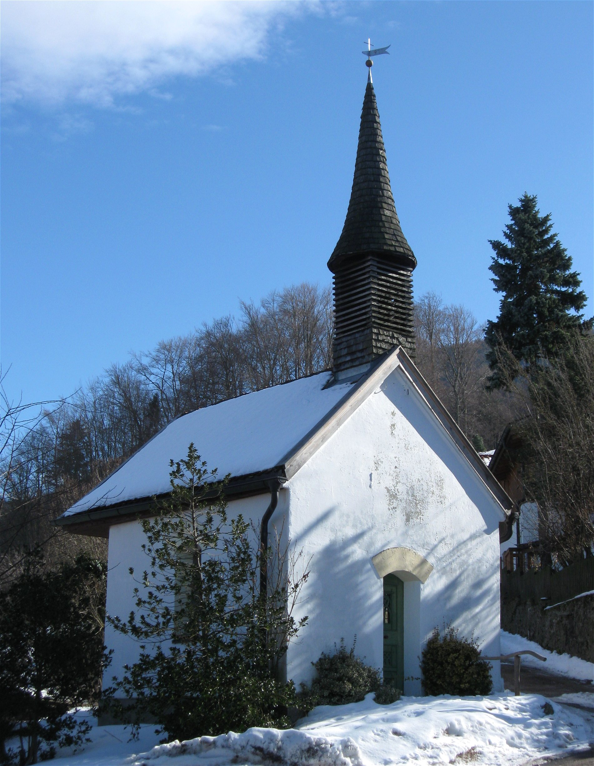 Altofing, Kath. Kapelle, 19. Jh.